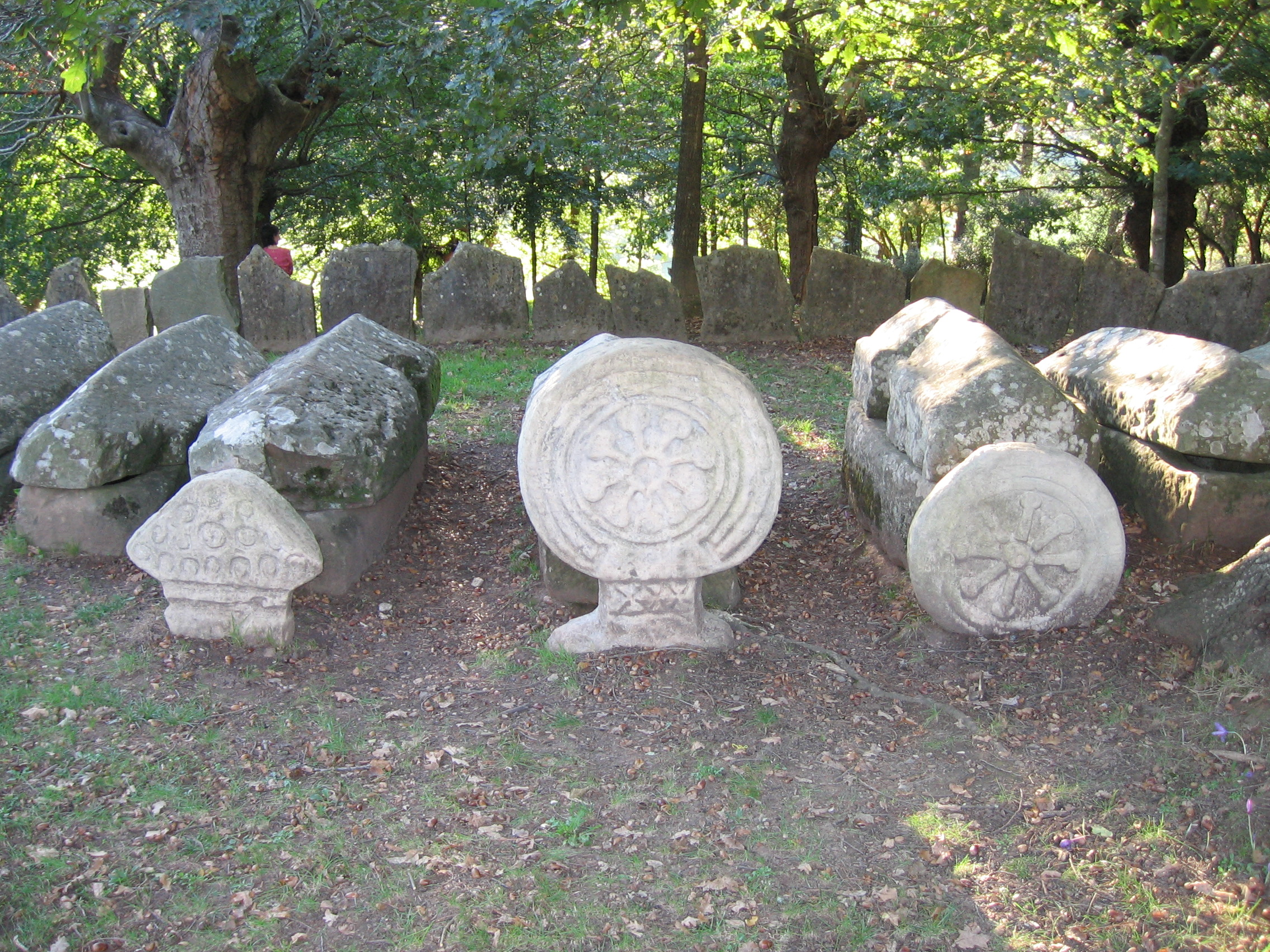 RI-55-0000054